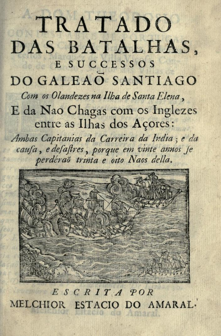 História Trágico-Marítima, Vol. II - Tratado das batalhas, frontispício